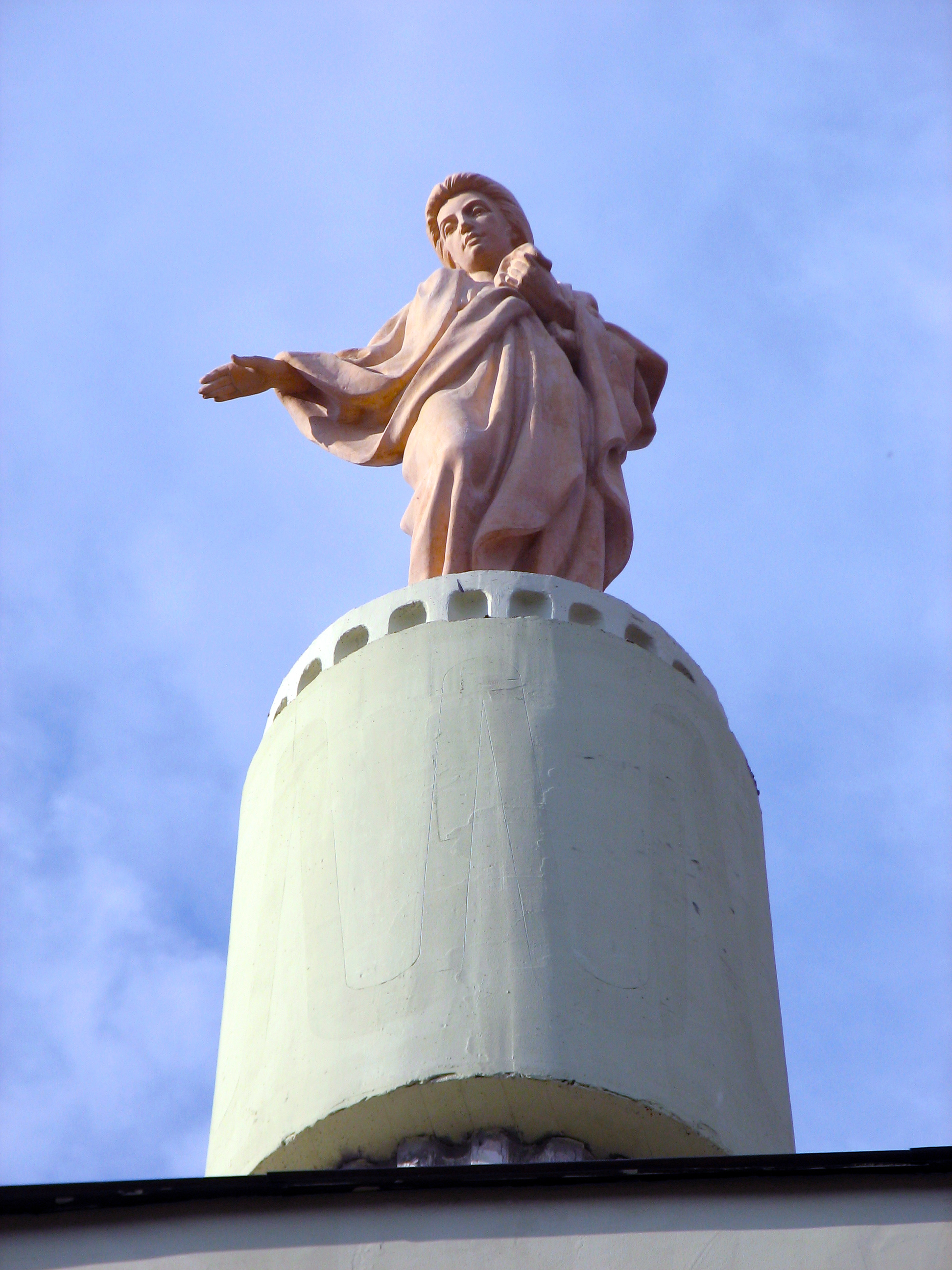 Беларуская (тарашкевіца): Рэшткі былога палацавага комплексу ў ::|Ружанах (Берасьцейская вобласьць): уезная брама. This is a photo of Belarusian heritage monument. Reference number: 112Г000640 ( WLM)